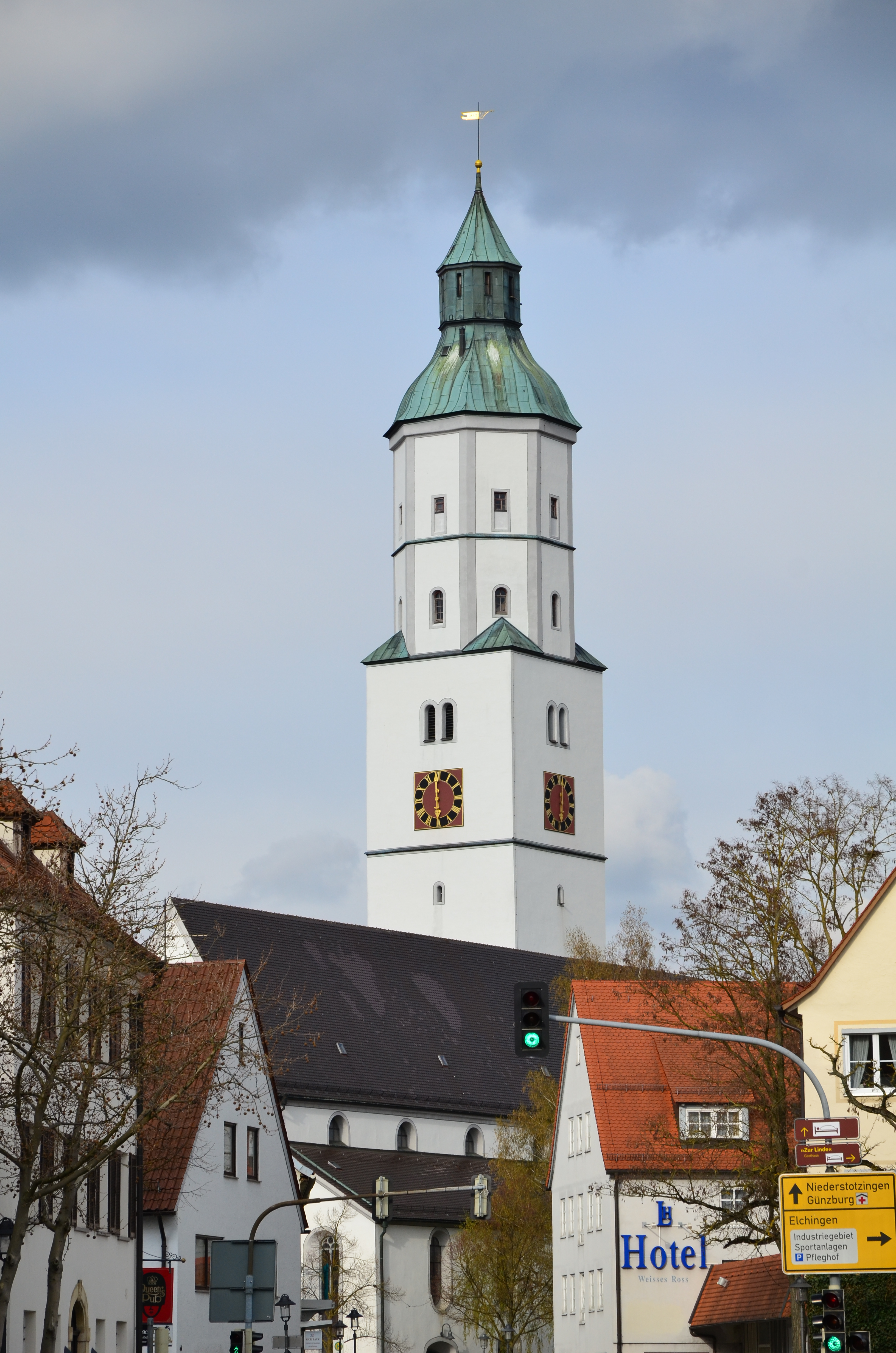 Evangelische Stadtpfarrkirche St. Martin in Langenau